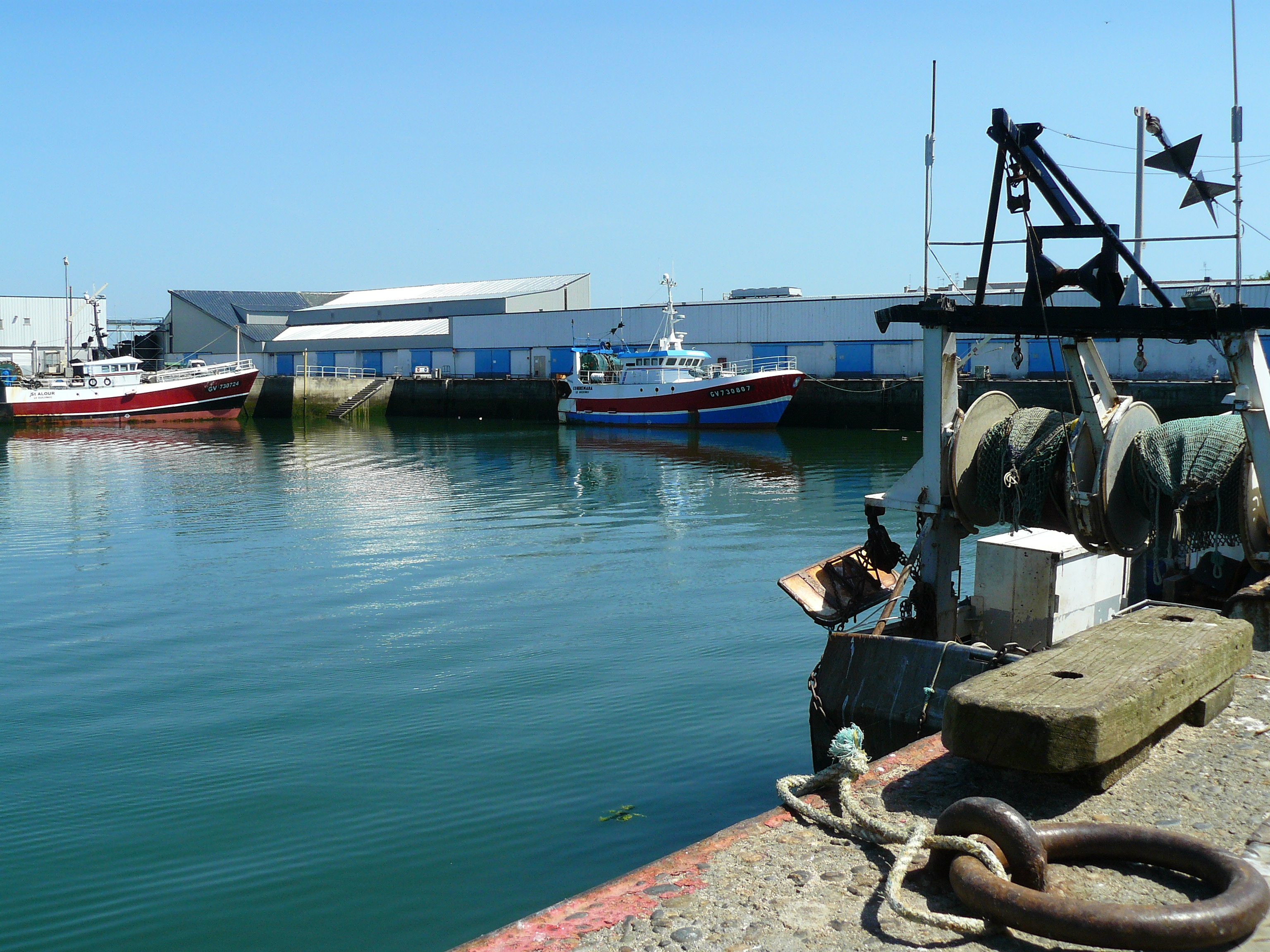 Chalutiers devant la criée de Loctudy.